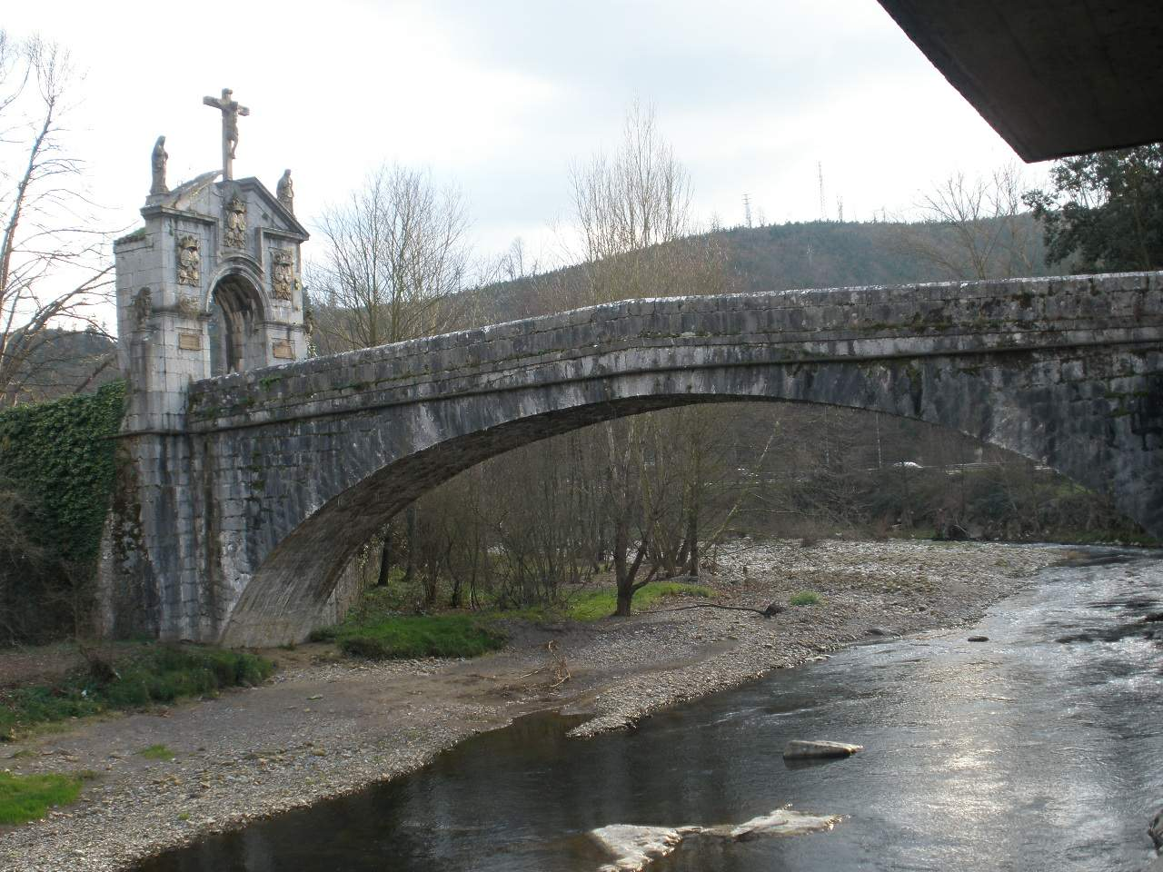 Puente de Anuntziba (Llodio, Álava)